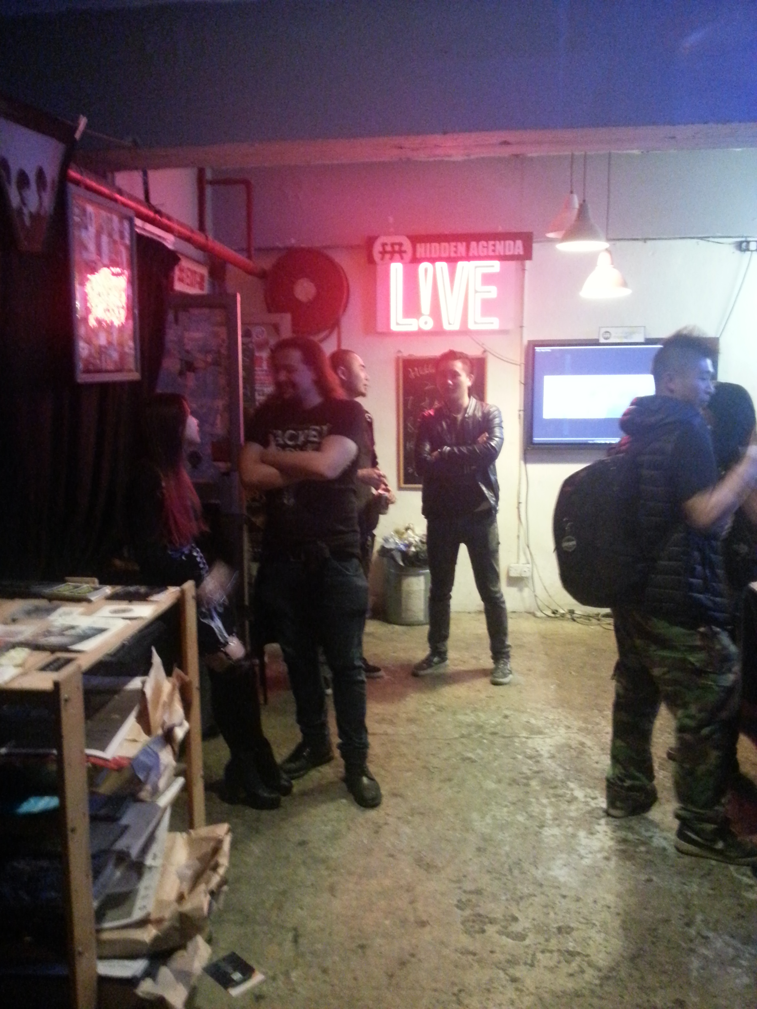 Hidden Agenda Interior